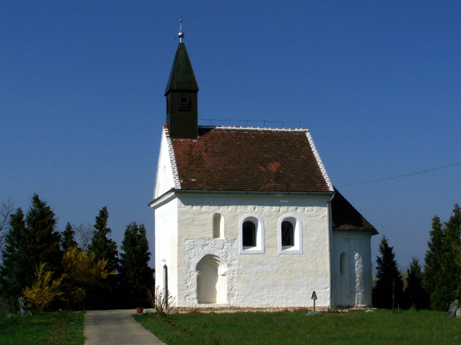 Szent Jakab római katolikus templom (Döröske, Régi temető) This is a photo of a monument in Hungary, Identifier: 8885